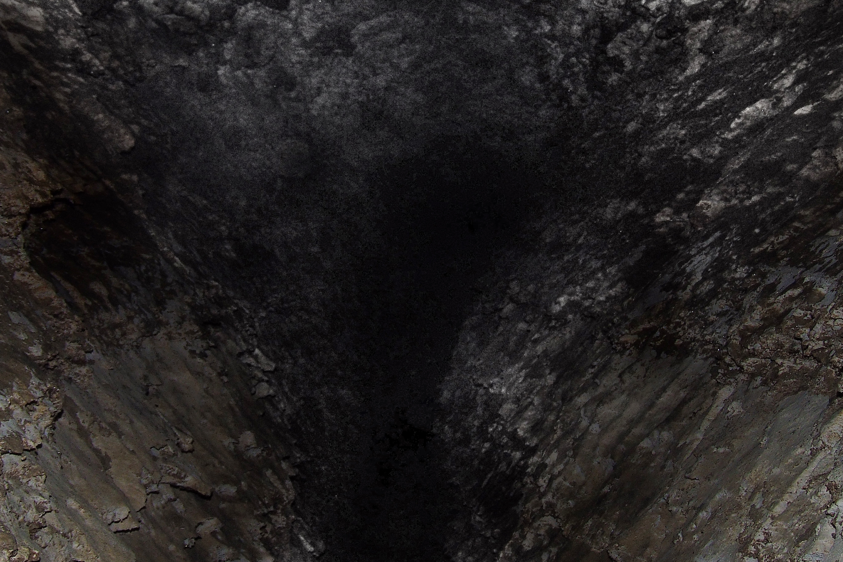 «Медобори»